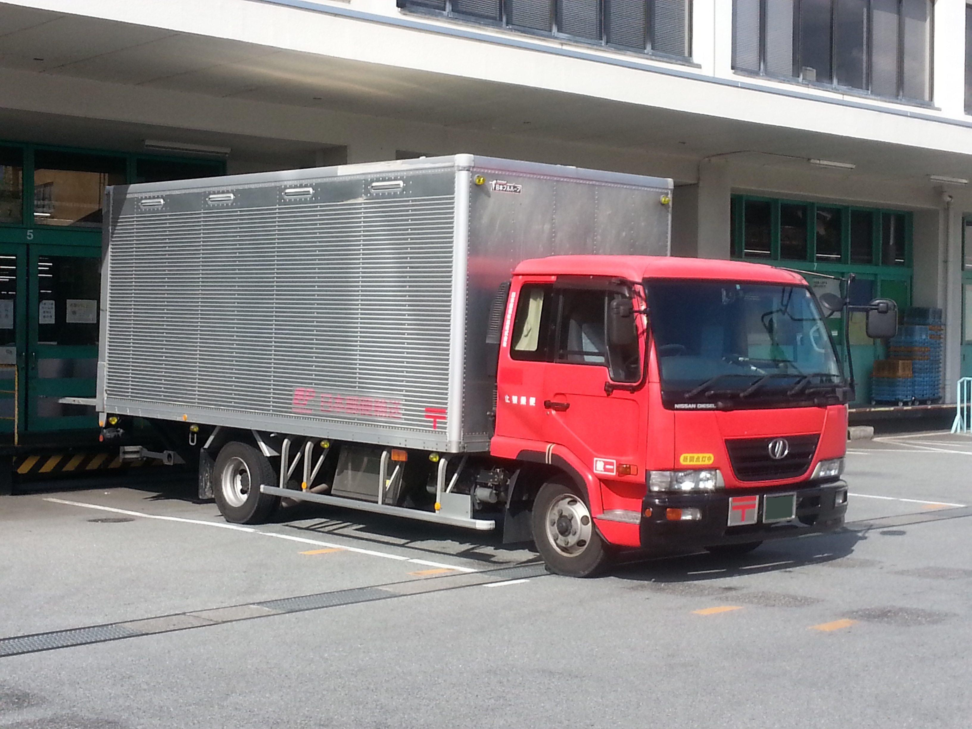 日本郵便輸送所属の日産ディーゼル「コンドル」です。甲府中央郵便局駐車場で撮影。 （なお、ナンバーと表記番号は加工して隠してあります）